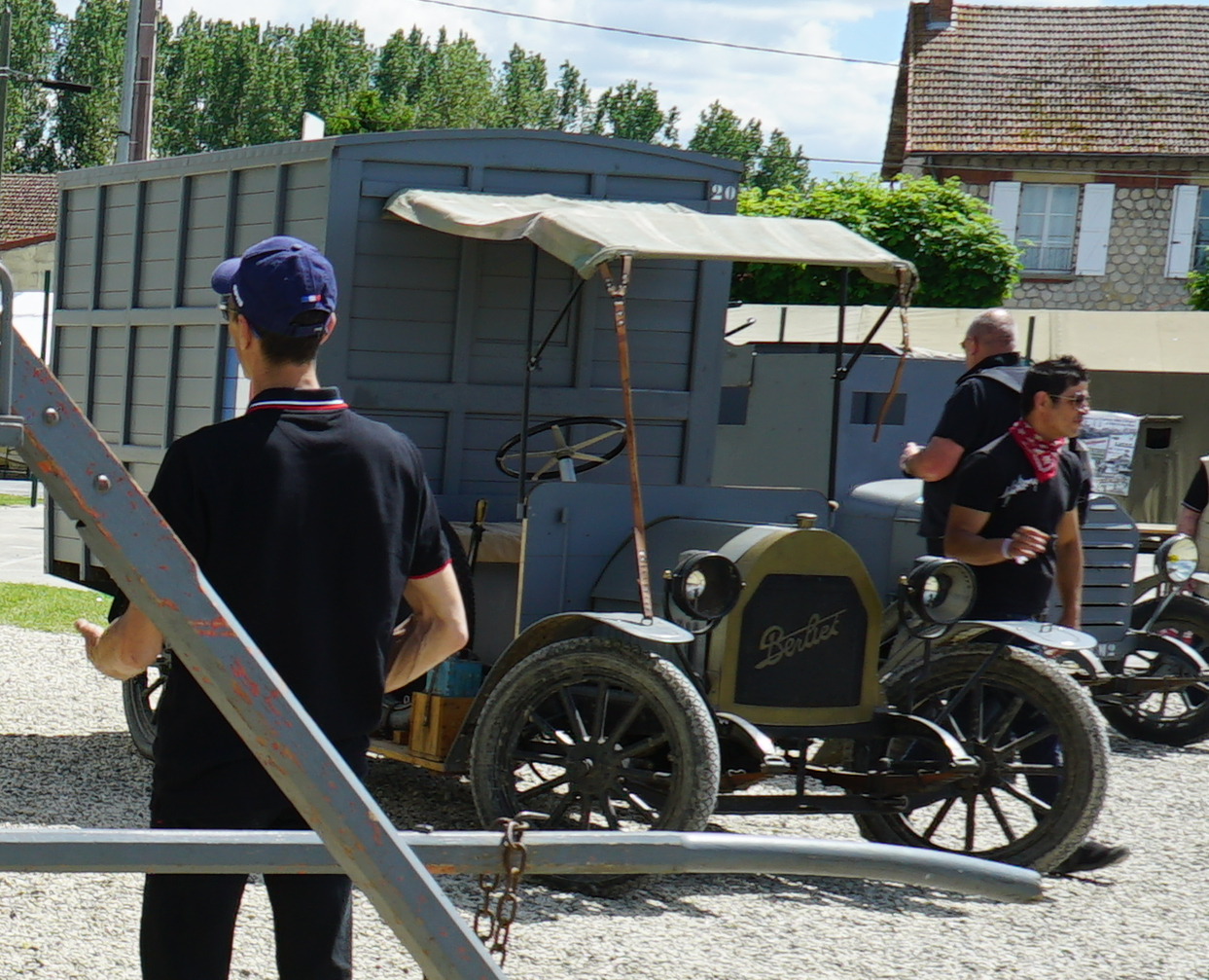 manifestation culturelle pour le centenaire de l'offensive Nivelle.